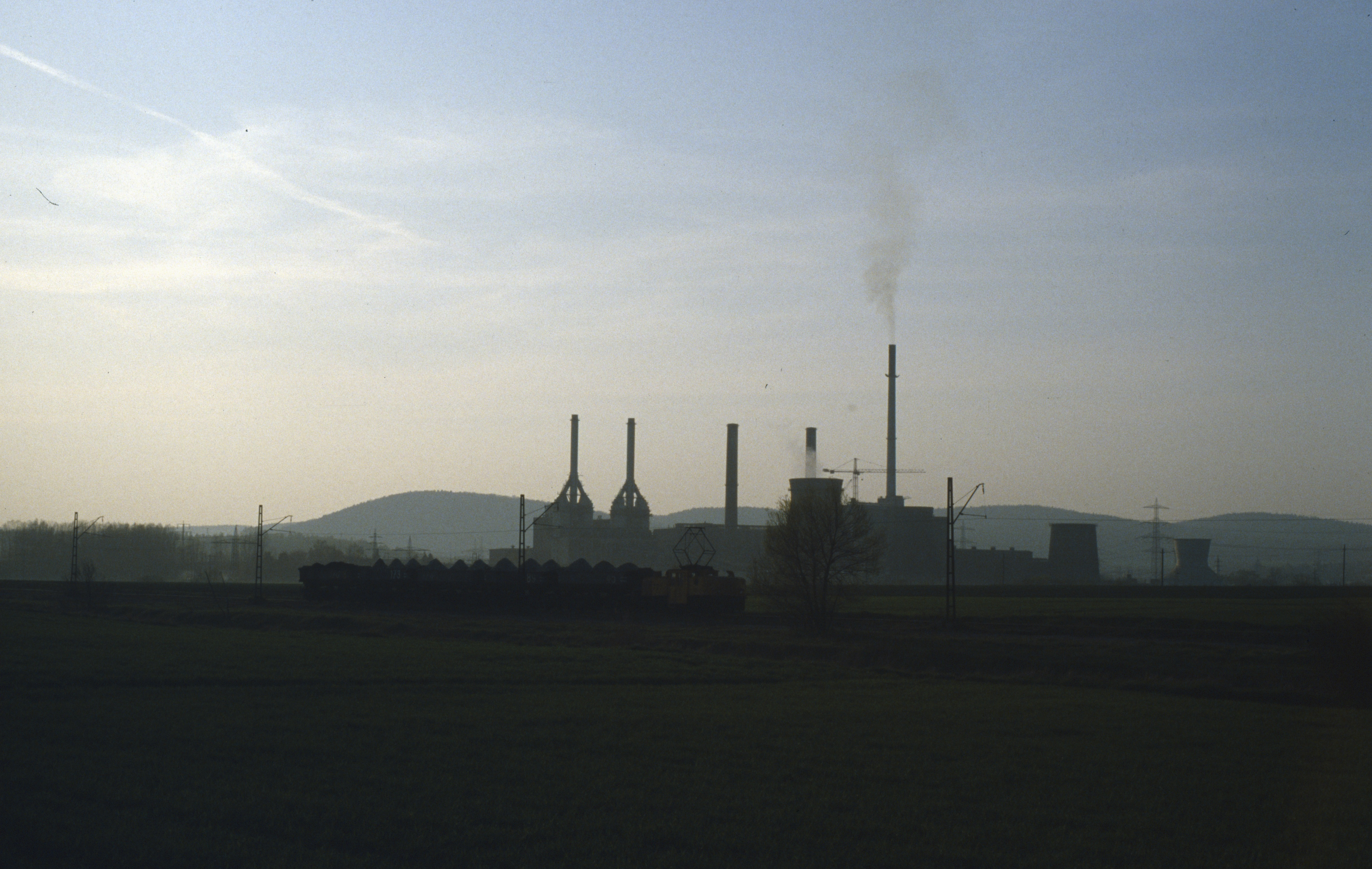 Schmalspurlok 73 (Spurweite 900 mm, Henschel 1957) mit Aschezug auf dem Weg vom Kraftwerk Borken zum Tagebau Gombeth